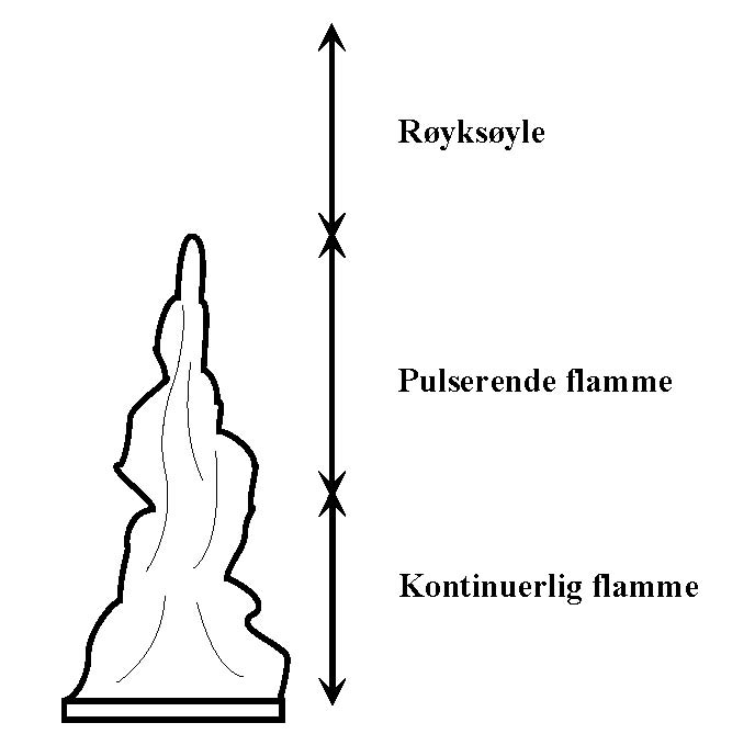 Soner i flammen